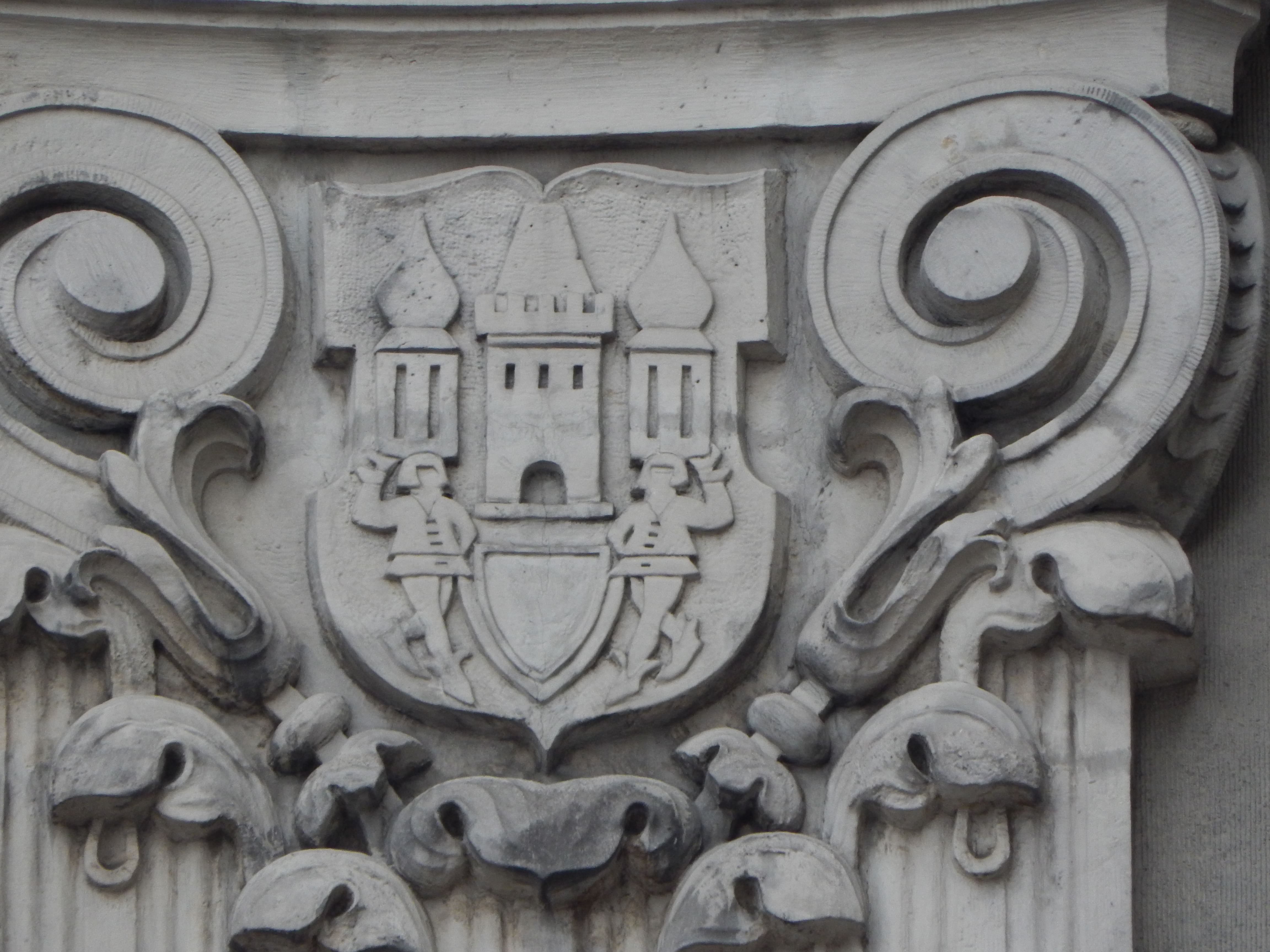 Fragment elewacji gmachu Sejmu Śląskiego - herb Skoczowa